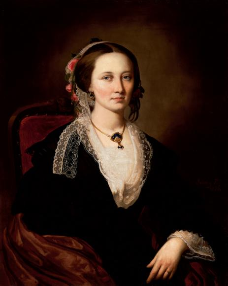 Ónody Anna a Nemzeti Színház balettkarának táncosnője, Jakobey Károly, majd Lotz Károly felesége